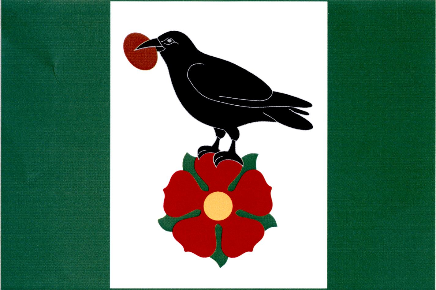 Vlajka obce Přední Výtoň